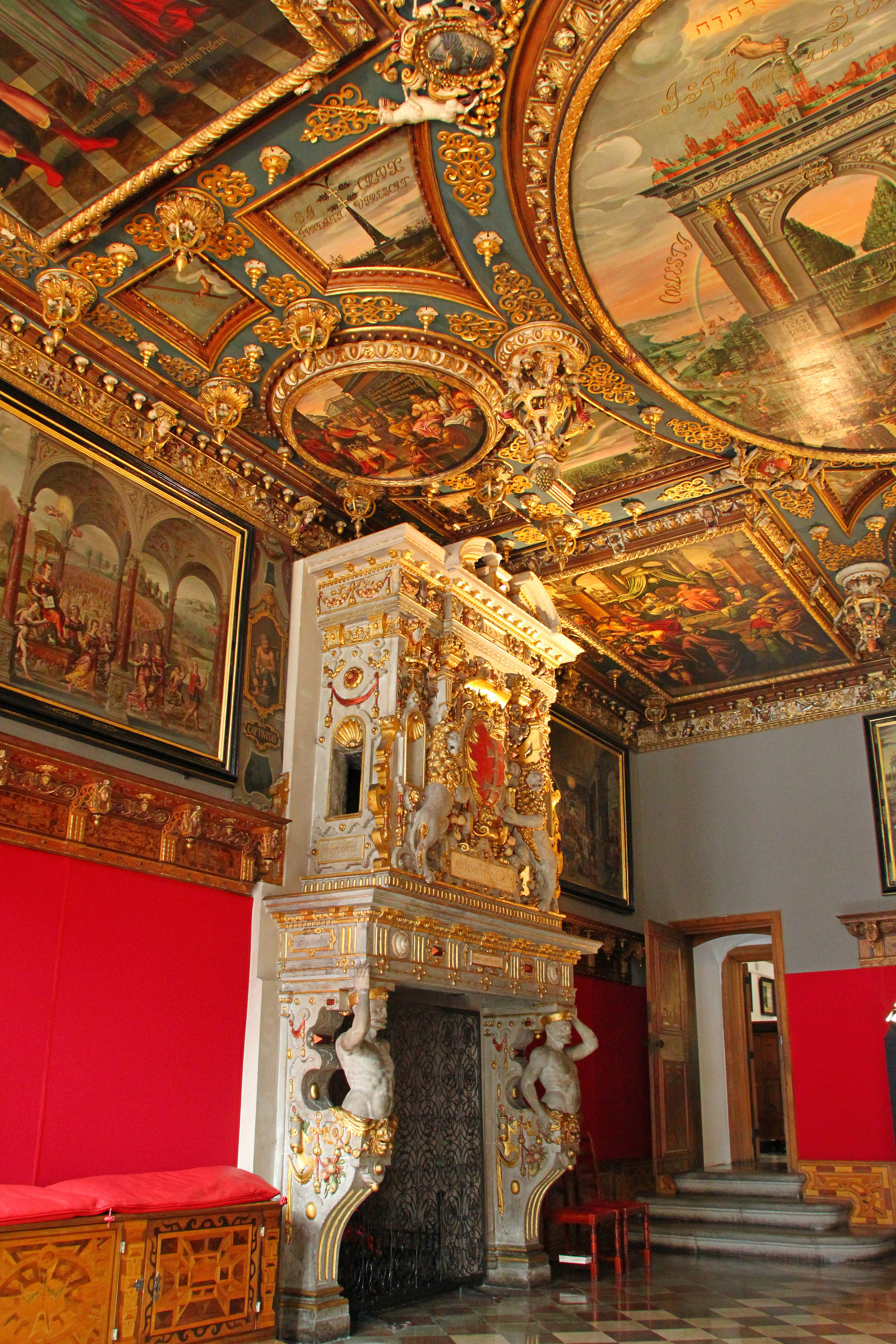 Gdańsk, ratusz Głównego Miasta, ob. Muzeum Historyczne, 1378-XV